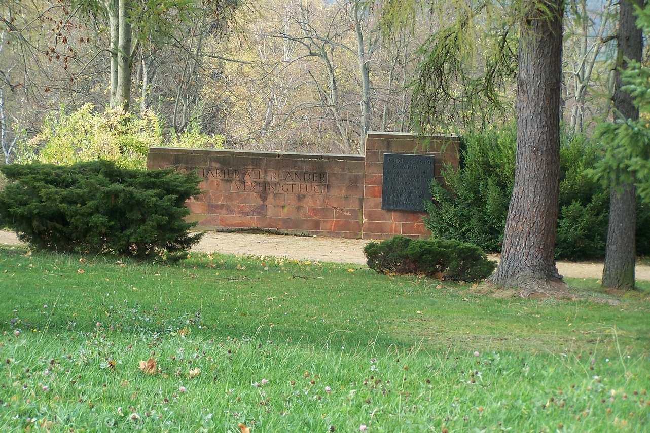 Im Kurpark Friedrichroda, Blick zum Eccarius-Denkmal.